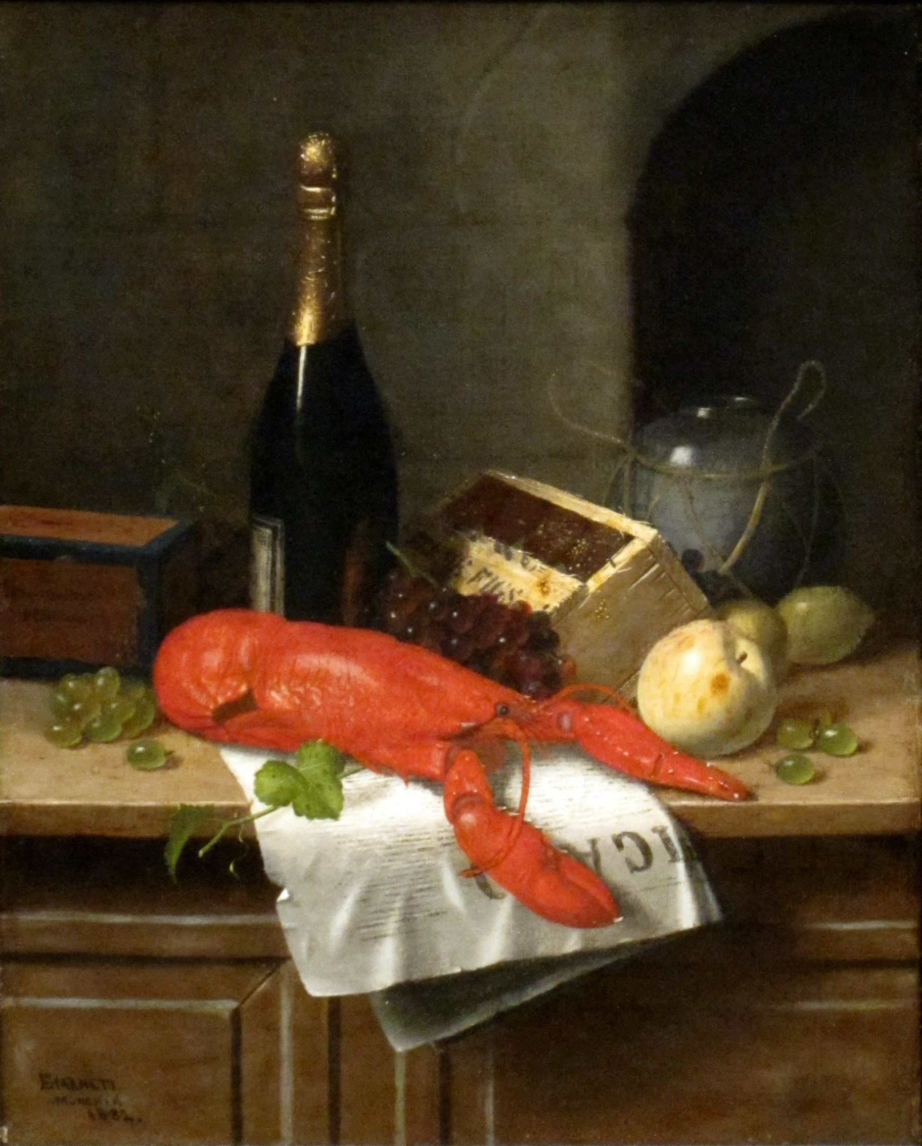 Lobster and Le Figaro